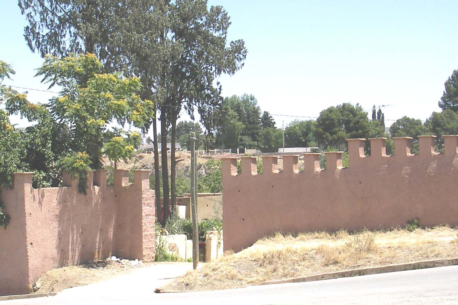 El Hajeb (Maroc) ; la Kasbah vue depuis le quartier Cantina